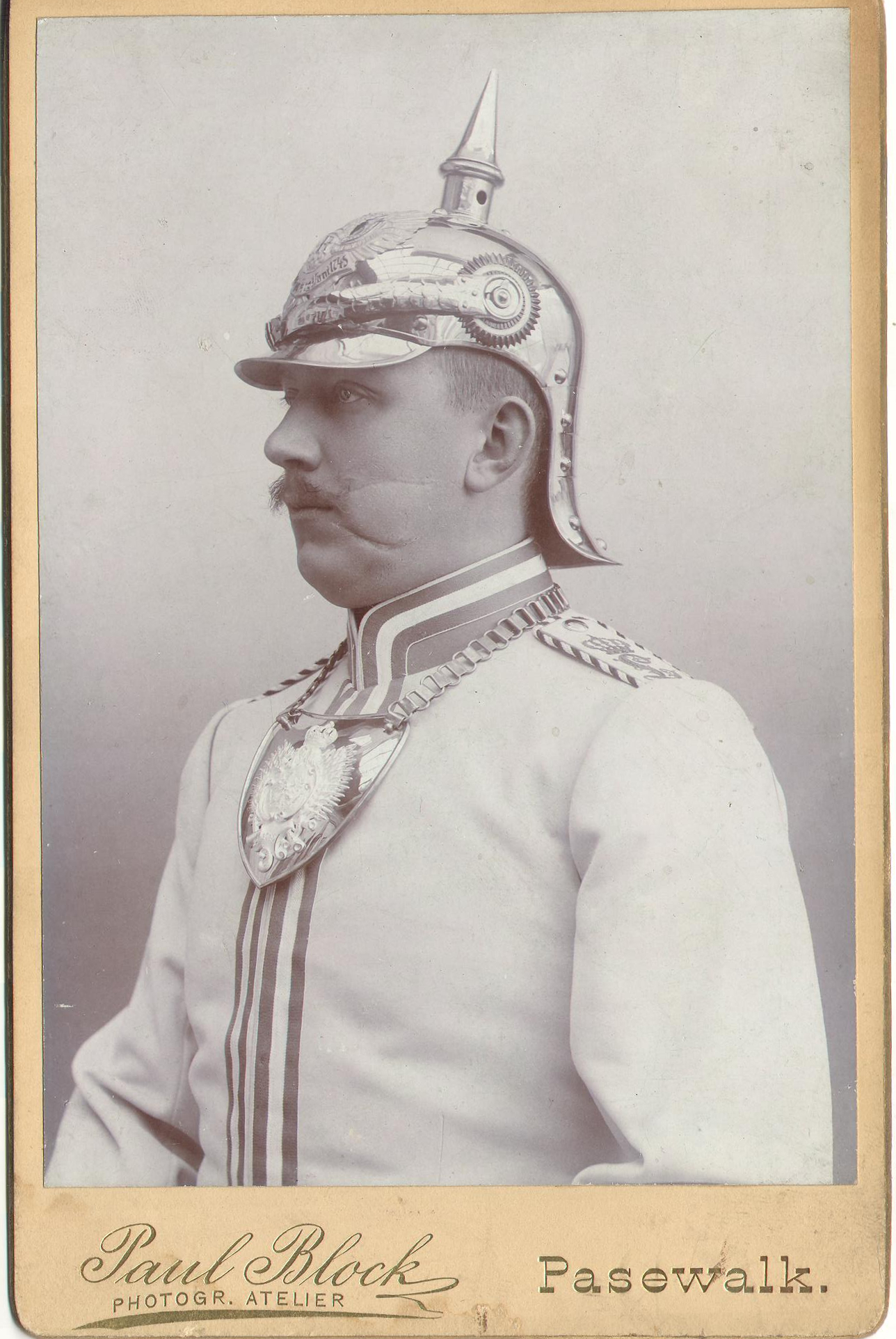 Von Paul Block 1899 erstelltes Bild einer Herrn von Stumpfeld, in der Uniform eines Pasewalker Kürassiers 1899